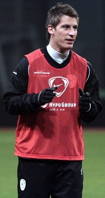 Valter Birsa